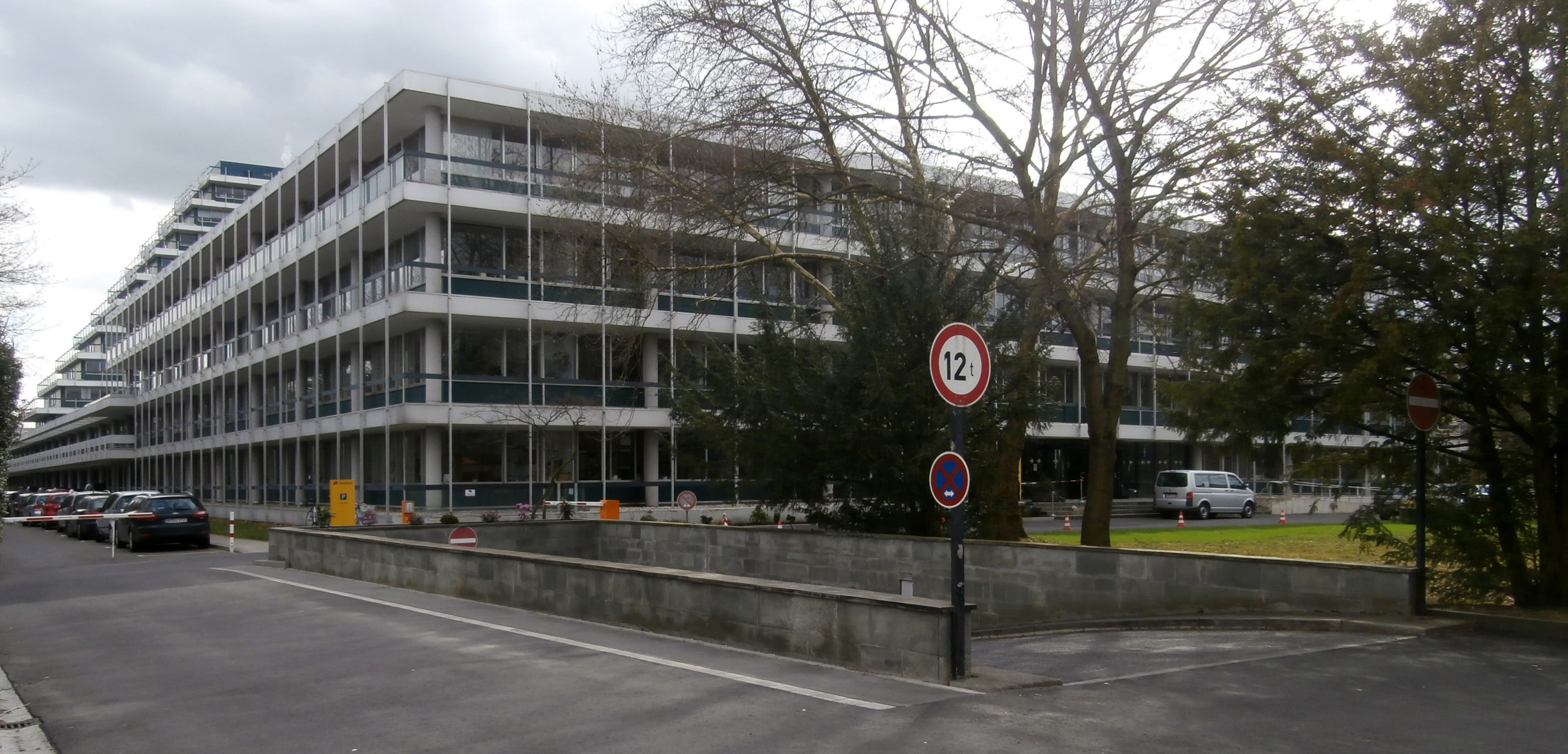 Deutsche Postbank, Kennedyallee 64–70, Plittersdorf, Bad Godesberg